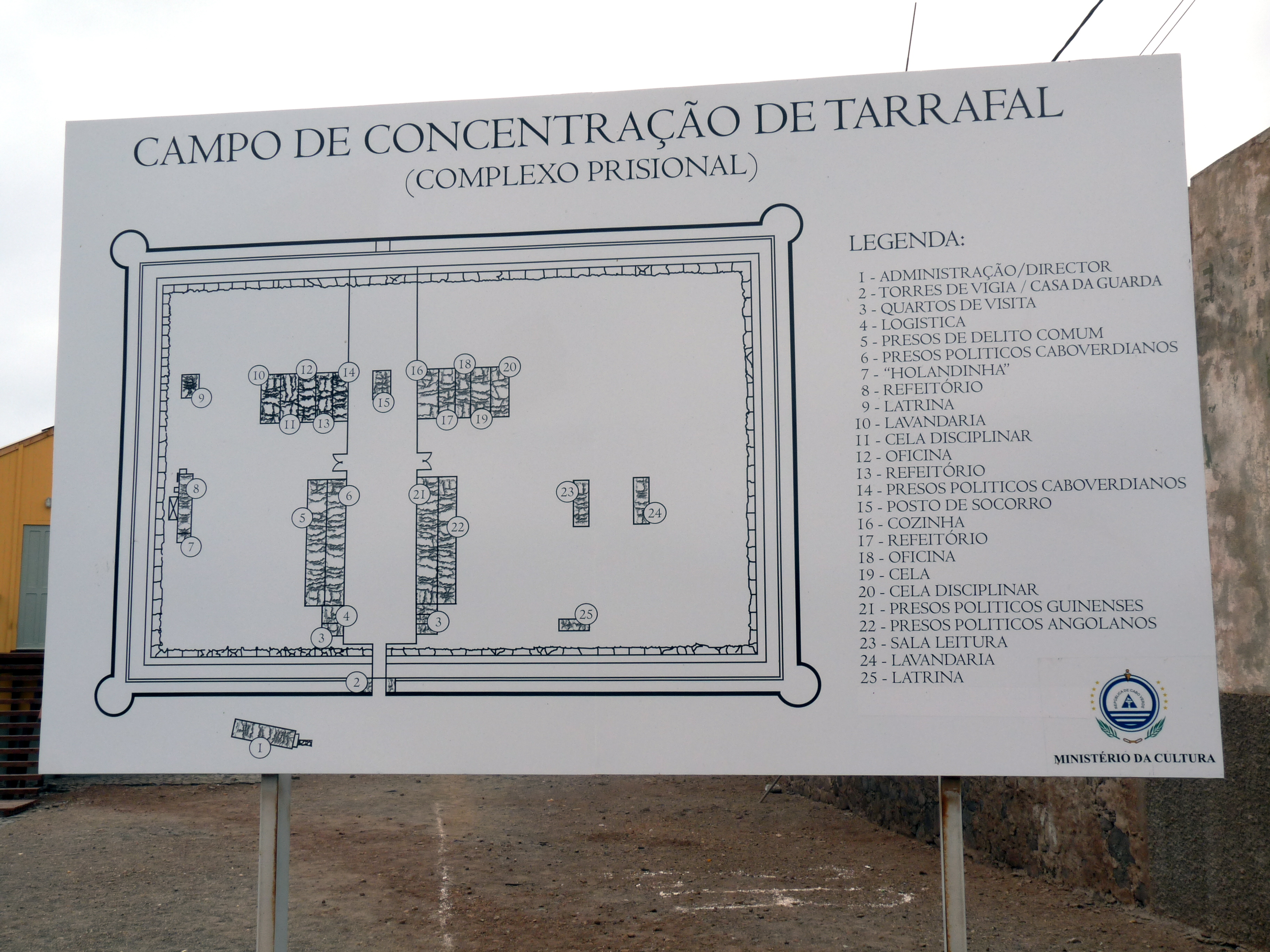 Antigo Campo de Concentração do Tarrafal, Ilha de Santiago - Cabo Verde / Old Concentration Camp in Tarrafal, Santiago Island - Cape Verde